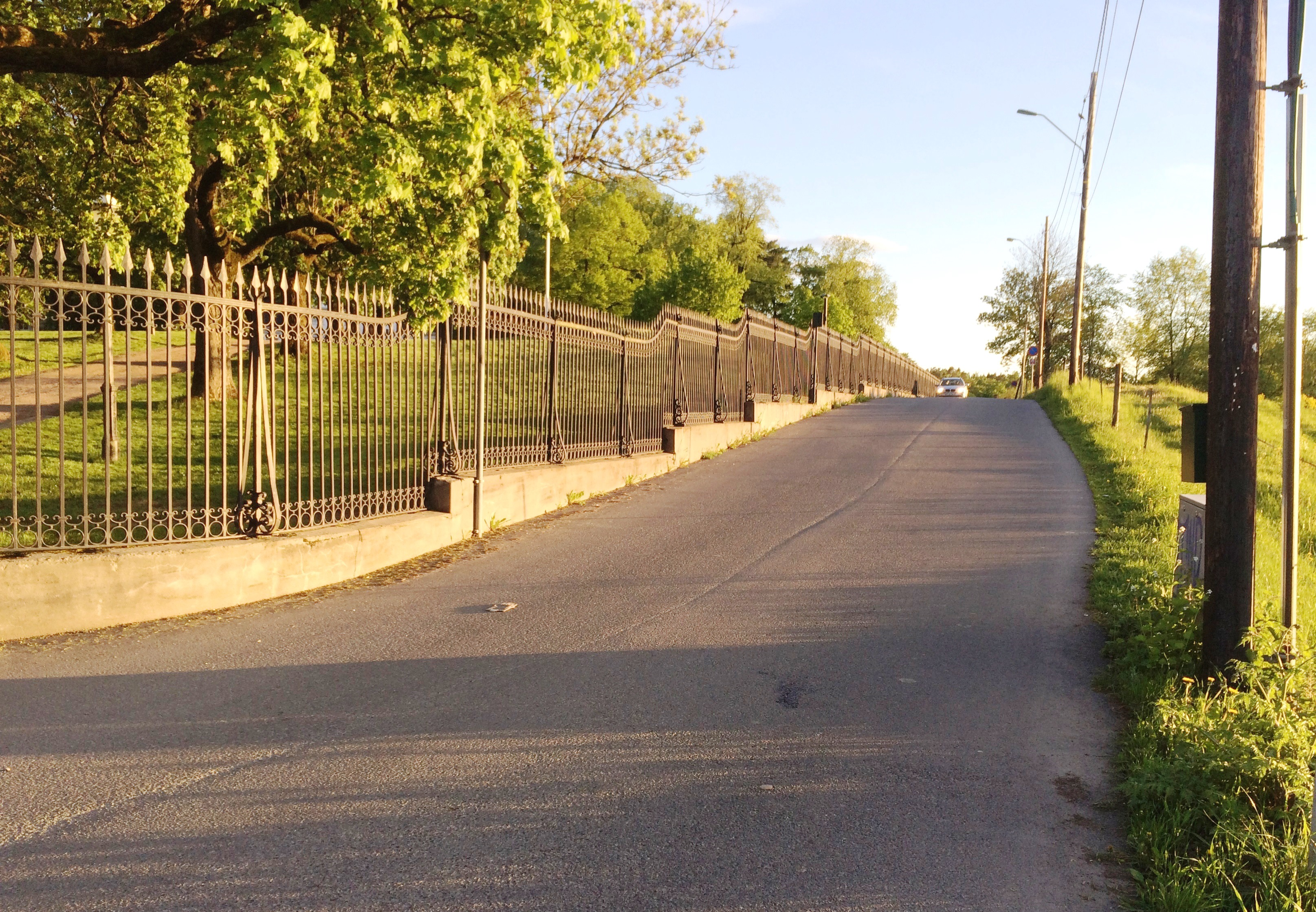 Nordøstenden av Christian Frederiks vei